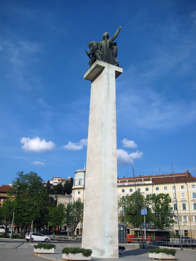 Spomenik oslobođenja u Rijeci, 3. svibnja 1955. godine